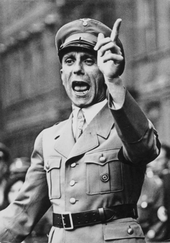 Reichspropagandaminister Dr. Joseph Goebbels spricht! "Nicht die Auslandspresse, sondern wir regieren in Deutschland"